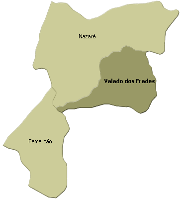 localisation de valado dos frades sur la freguesia de nazaré